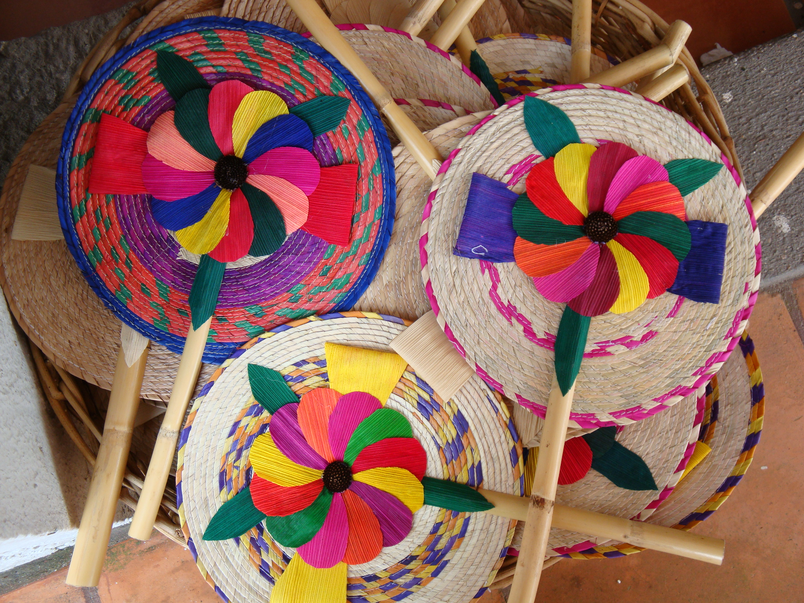 Abanicos tejidos. Artesanía típica del municipio de Nacajuca, estado de Tabasco, México.